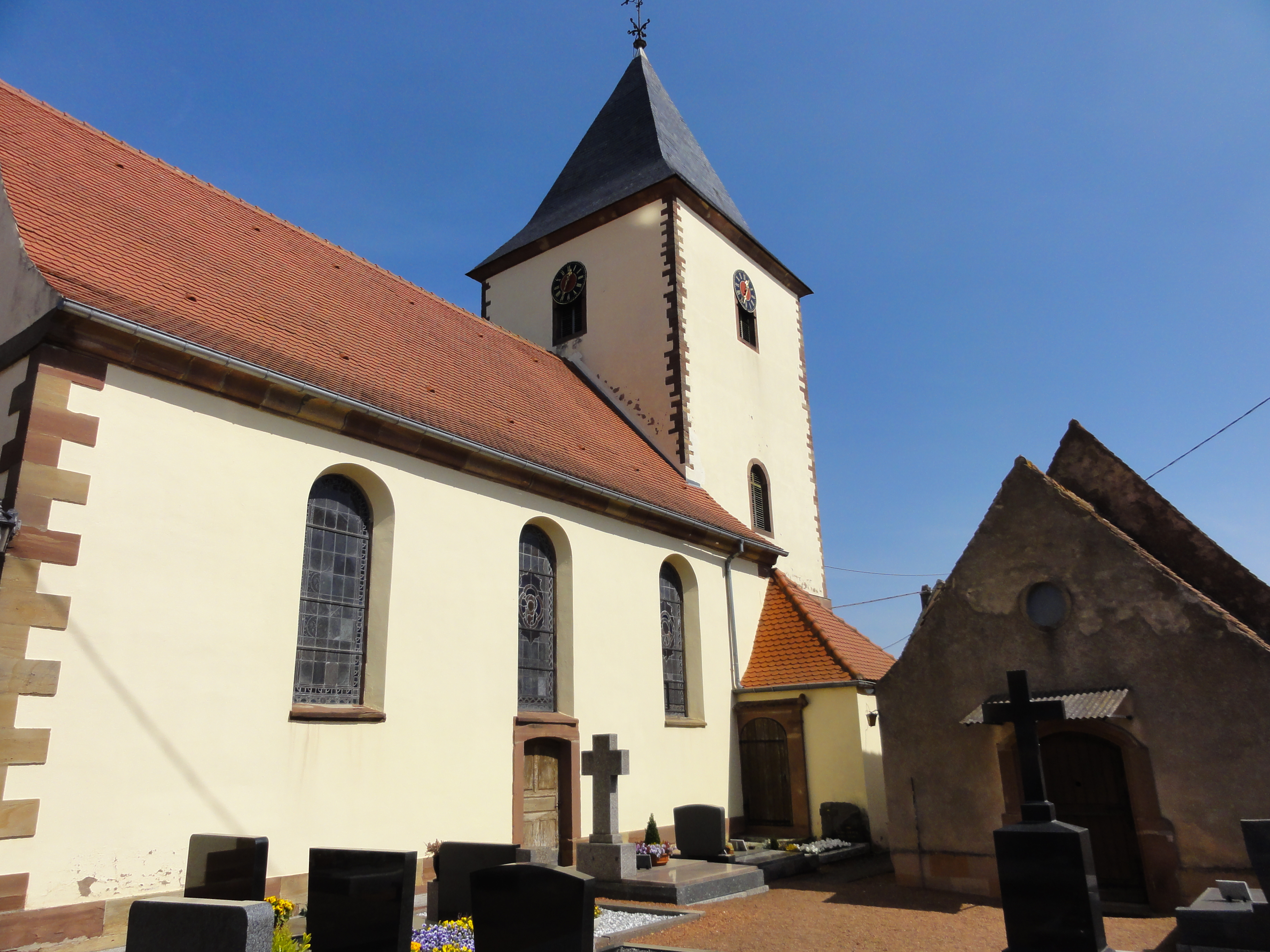 Alsace, Bas-Rhin, Maennolsheim, Église Saint-Vit (XVe-XVIIIe)